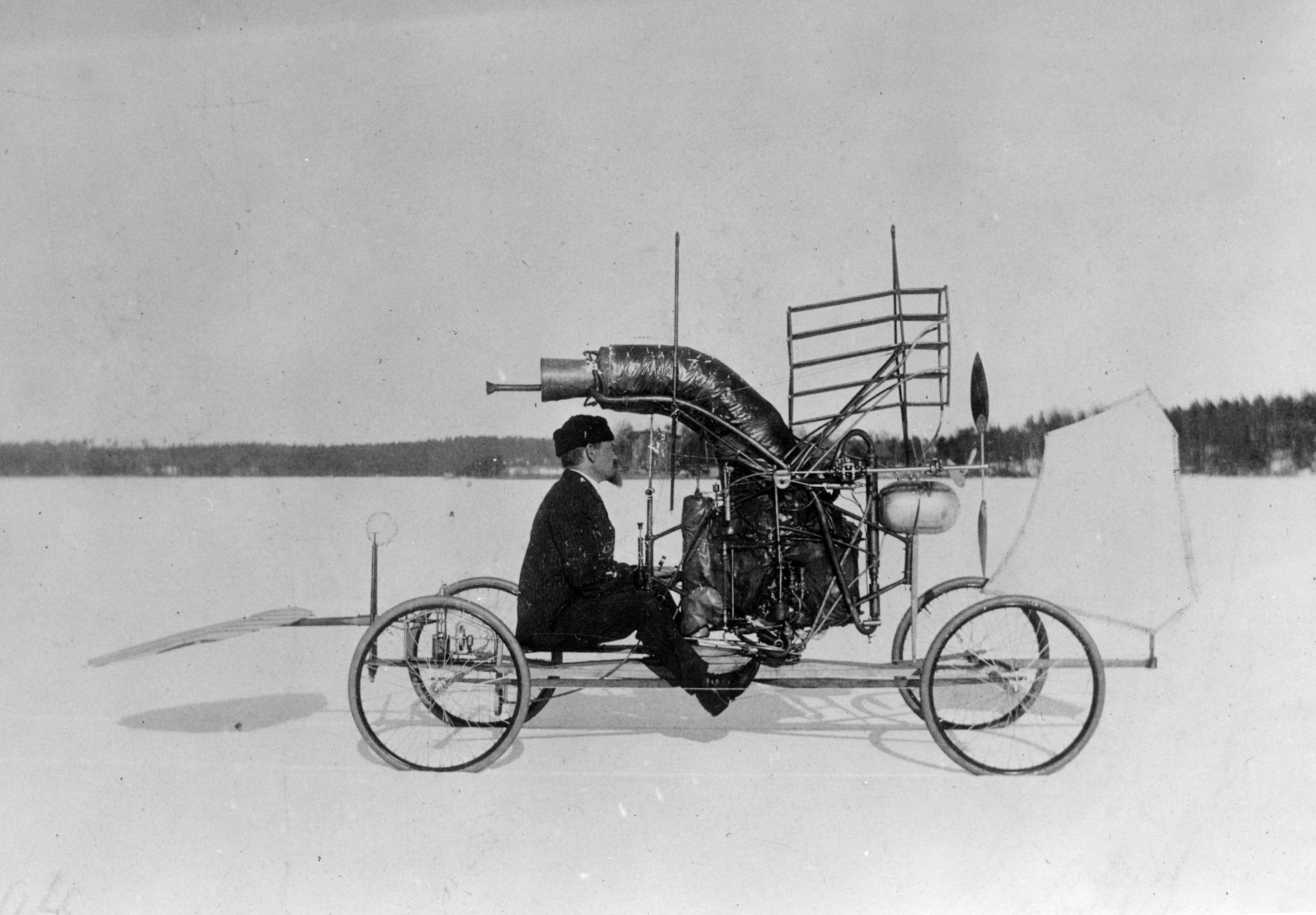 C. R. Nybergs i sin flygmaskin utan vingar för provning av ångmaskinen